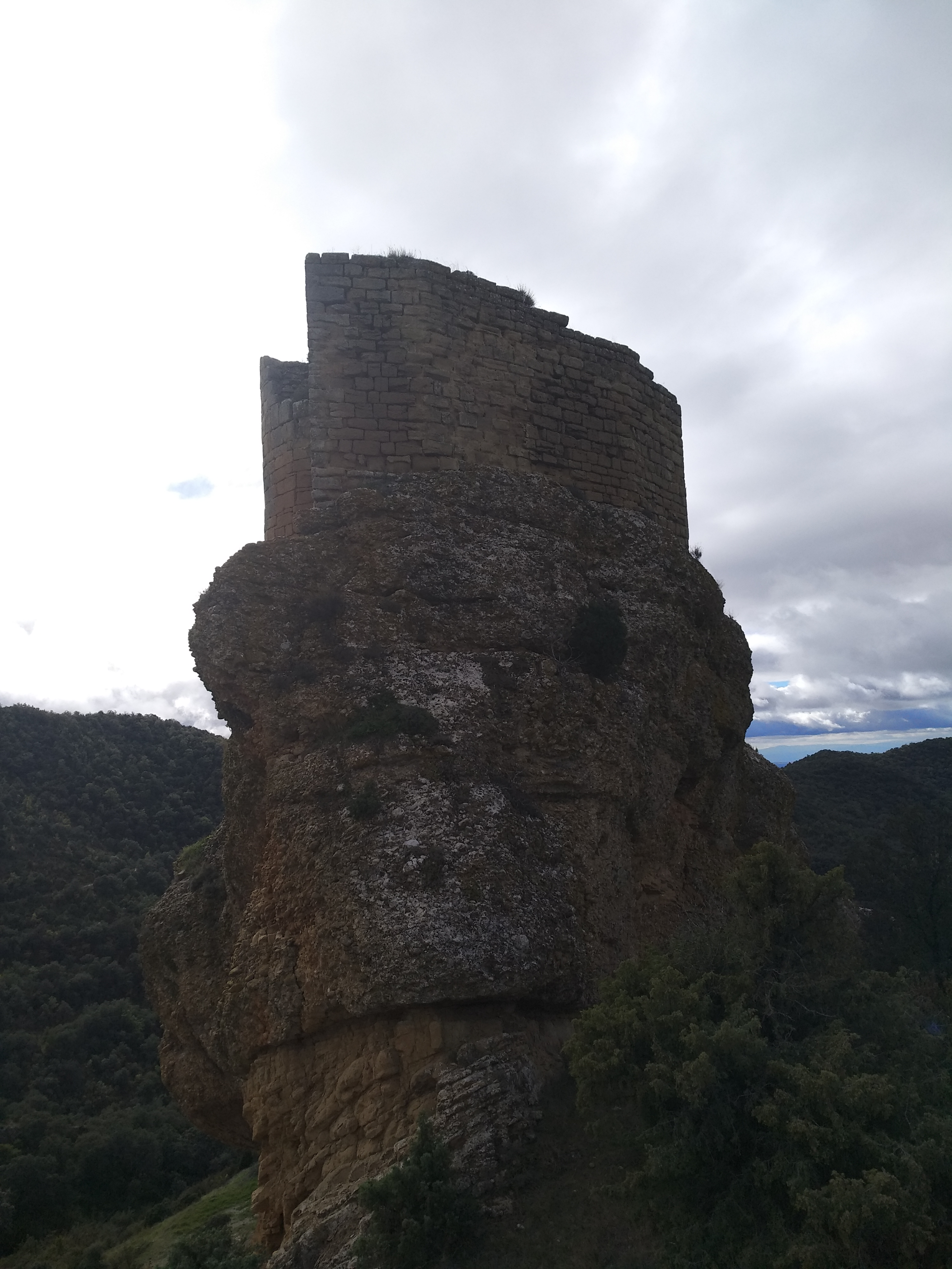 Vista de las actuales ruinas del castillo sobre la roca